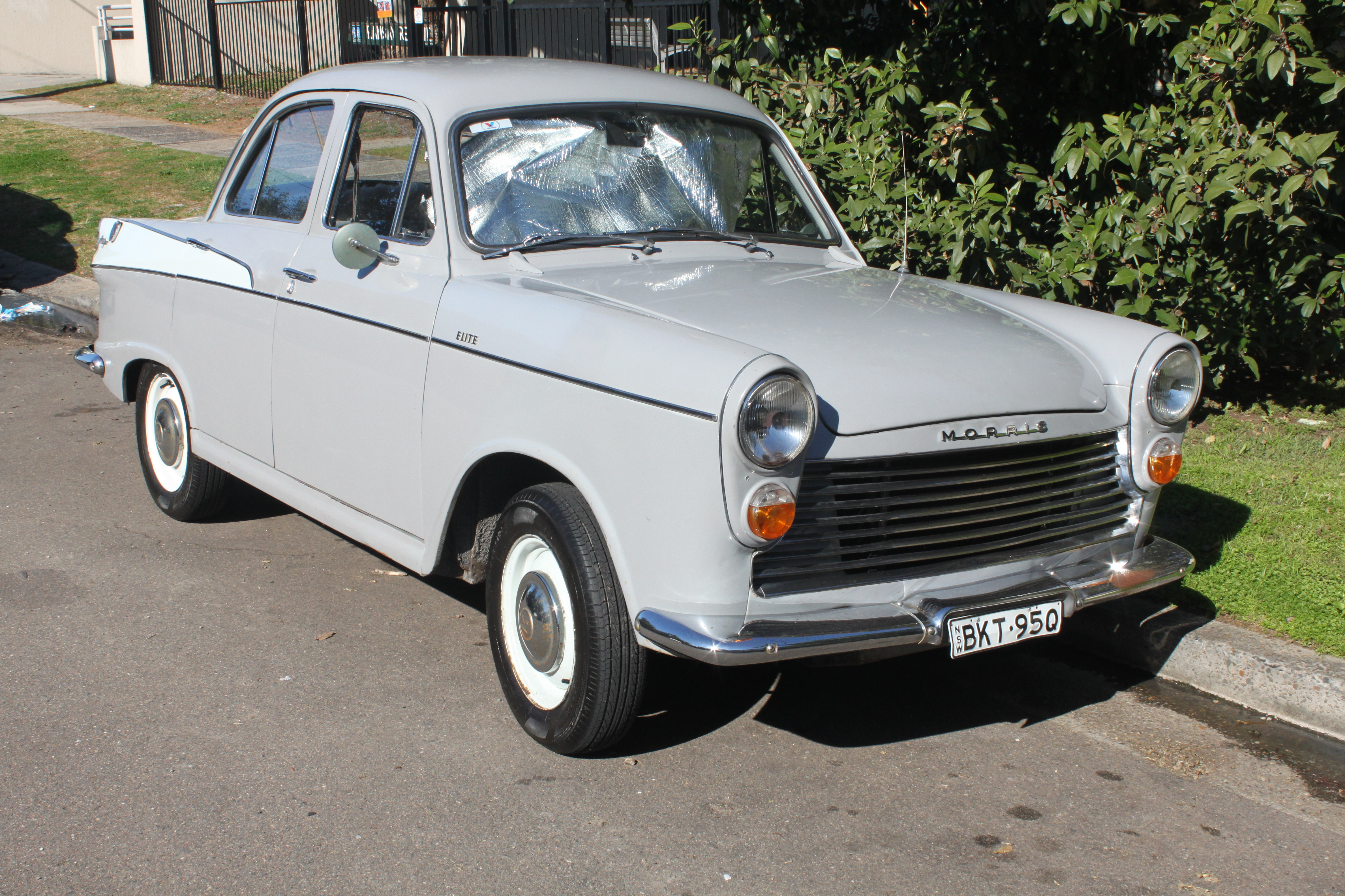 Morris Major Elite